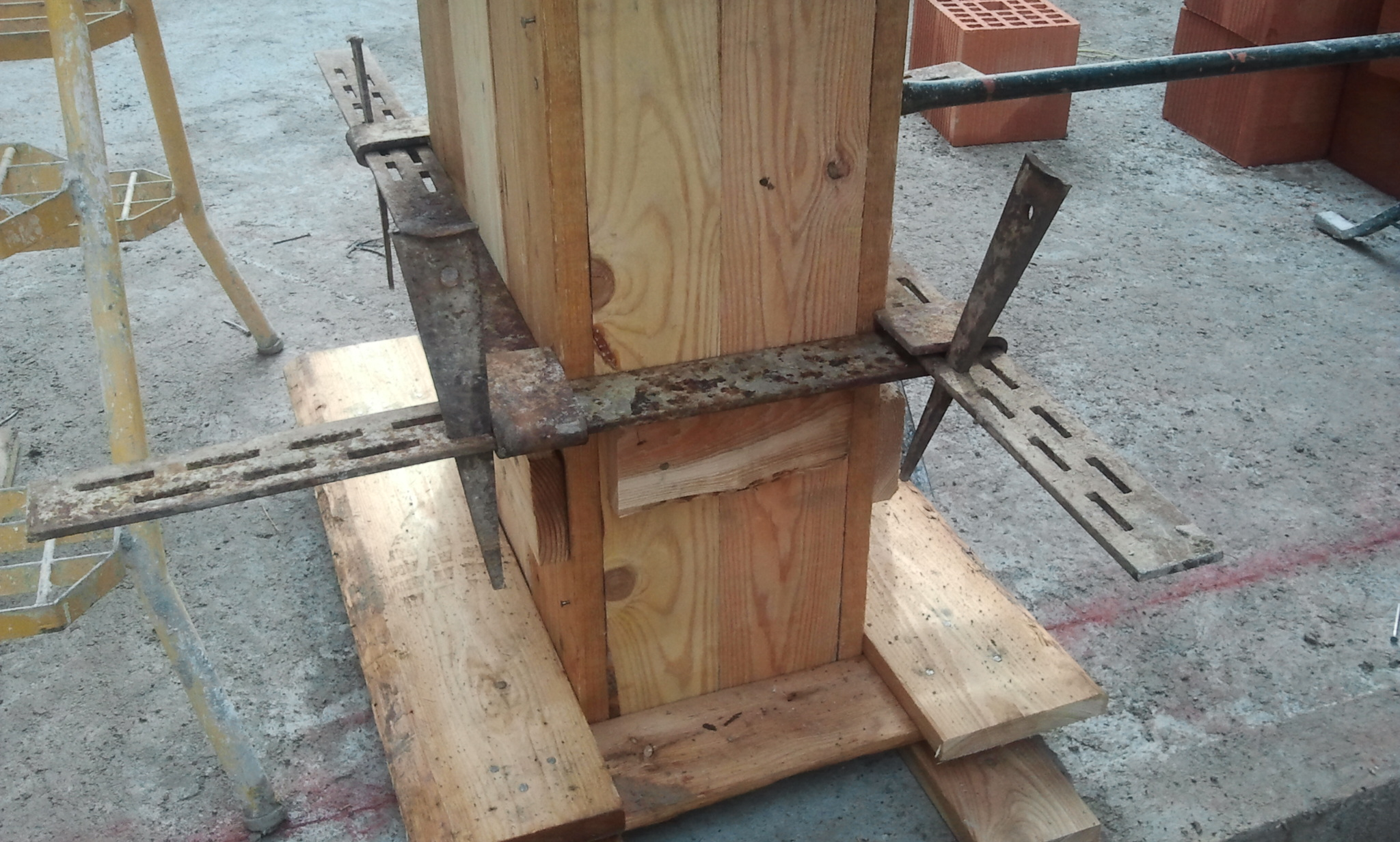 Lumbaart: Öna craàta di möradùr dovràda per tègn insèma l'armadüra d'ü pilaster.